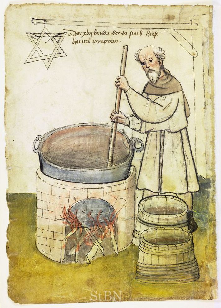 herttel (Hertel) pyrprew (Bierbrauer) , pyrprew (Bierbrauer) Transkription und weitere Informationen